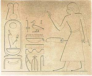 Merymose at Konosso